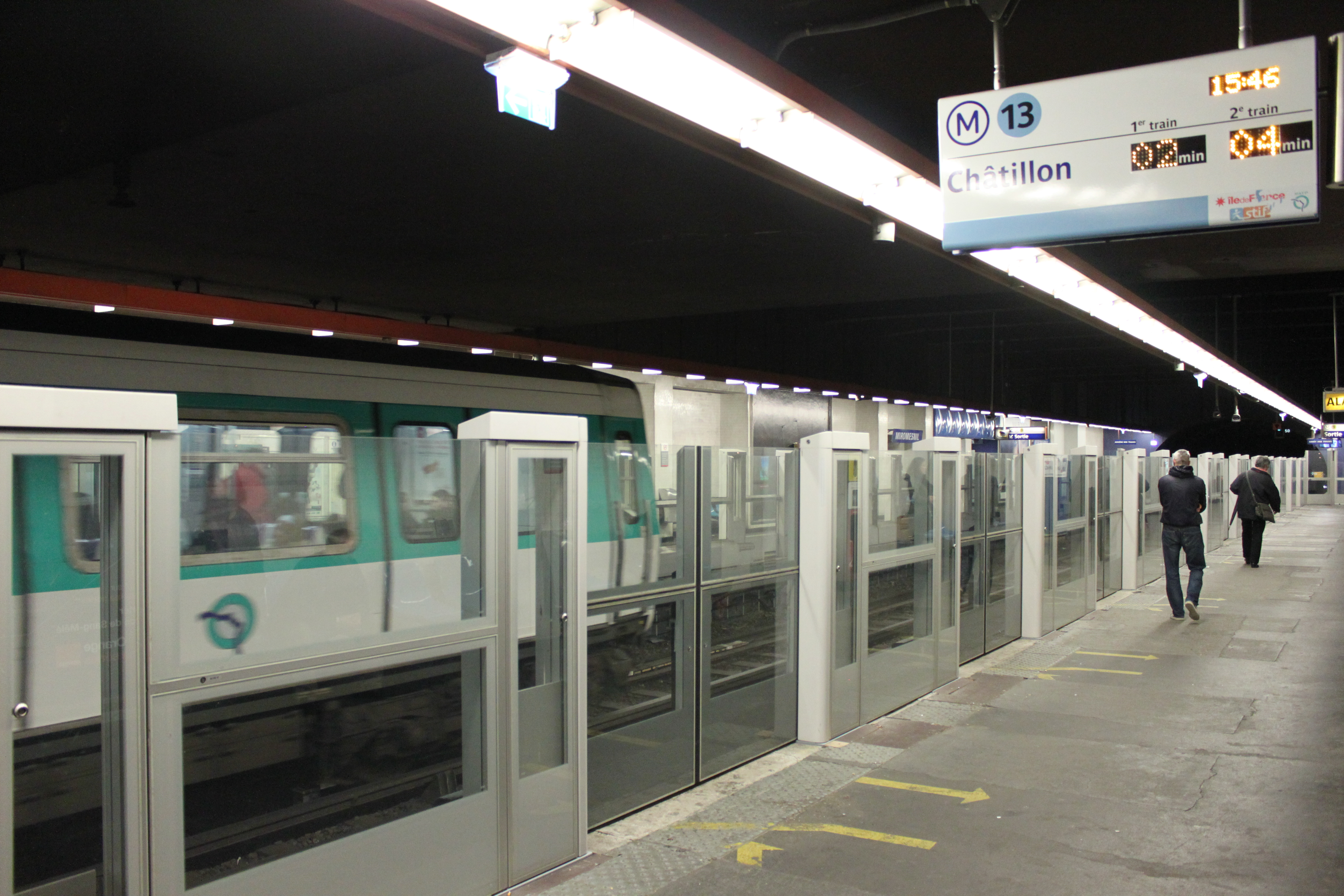 Porte palière de grande hauteur à la station Miromesnil sur la ligne 13 du métro de Paris.